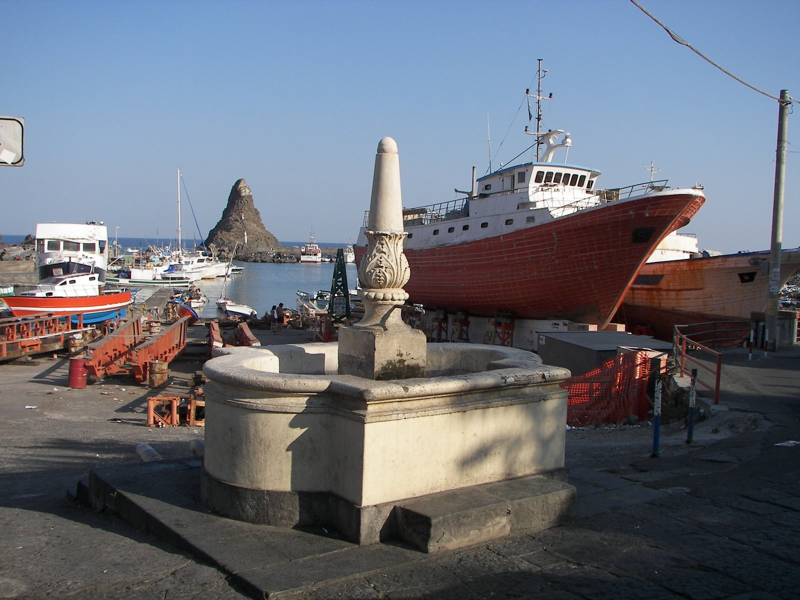 Fontana di Aci Trezza denominata "Sgriccio"